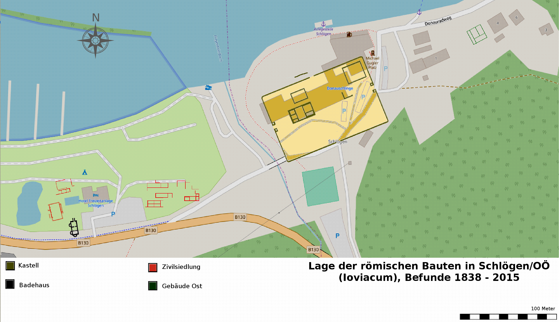 Skizze der römischen Befunde in Schlögen (OÖ), 1838 - 2015, Kastell Ioviacum. Diese Karte entstammt dem offenen OpenStreetMap-Projekt, erstellt von der Gemeinschaft. Diese Karte kann unvollständig sein oder Fehler enthalten. Verlasse dich in Navigationsfragen nicht alleine darauf.